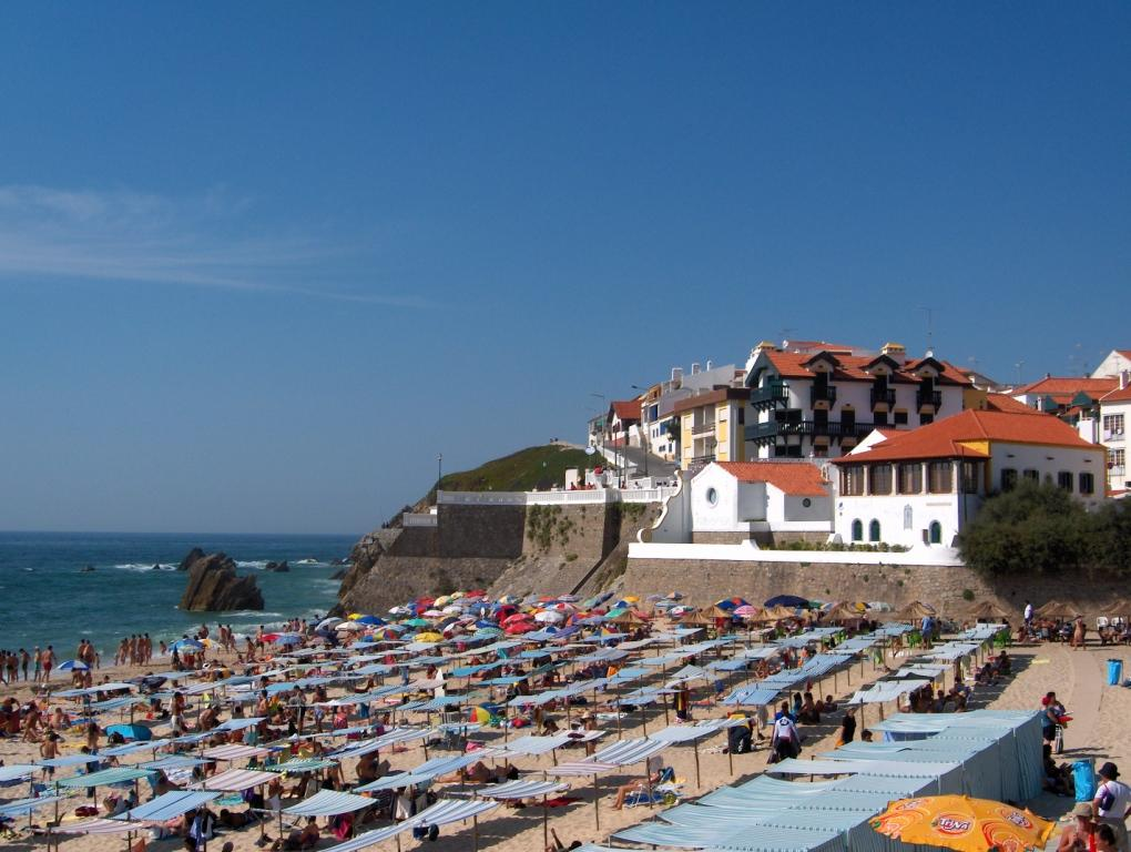 Vista parcial da Praia de Sao Pedro de Moel.